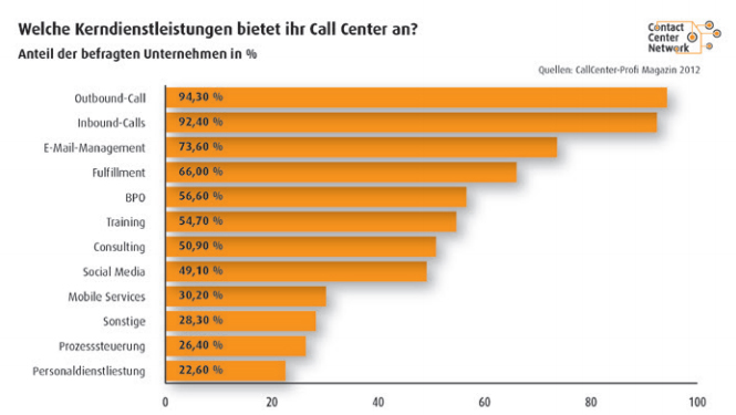 Verteilung der Dienstleistungen in Callcentern